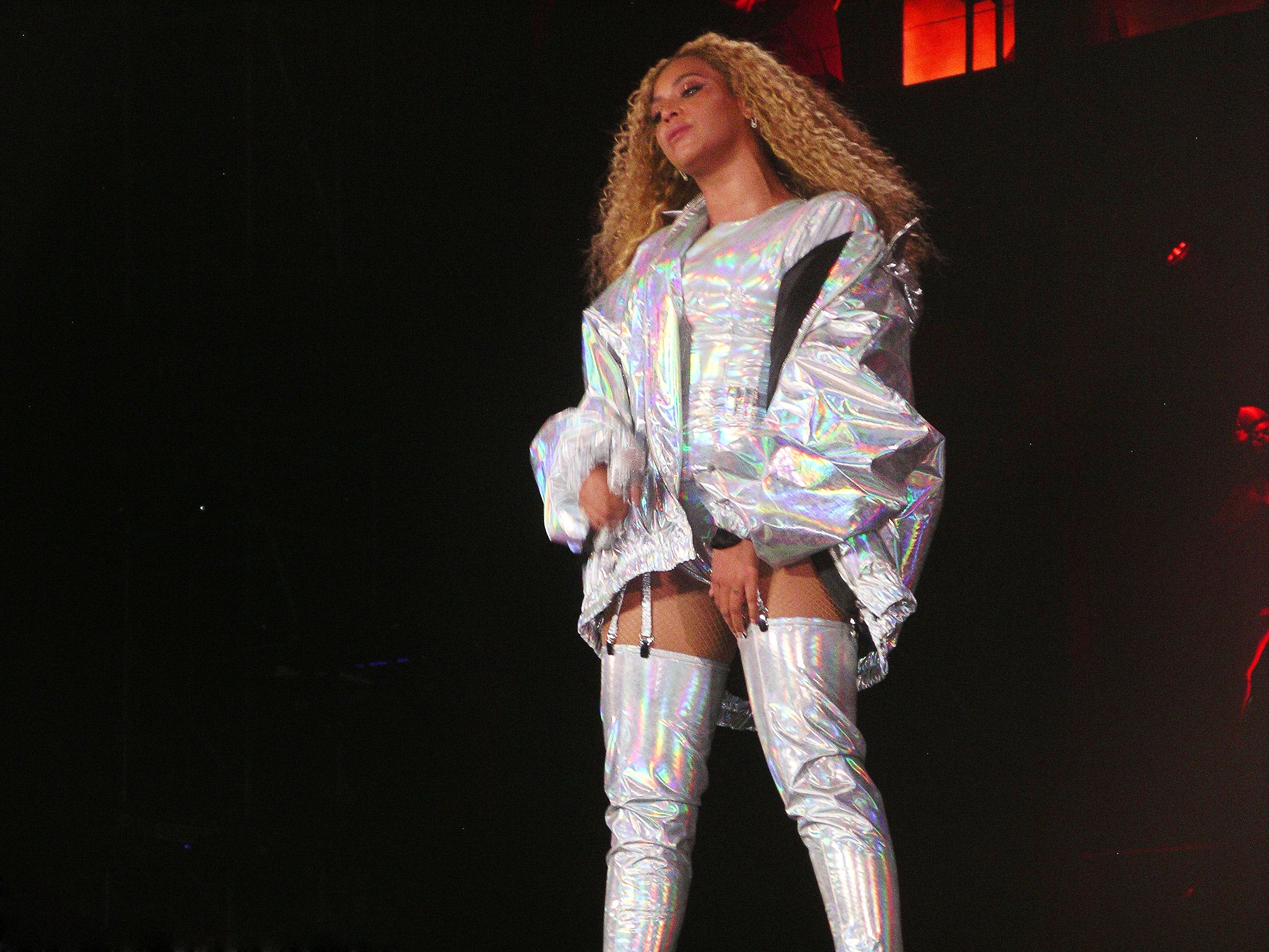 Beyonce en Roma durante el On the Run Tour II el 8 de julio de 2018 en el Stadio Olimpico